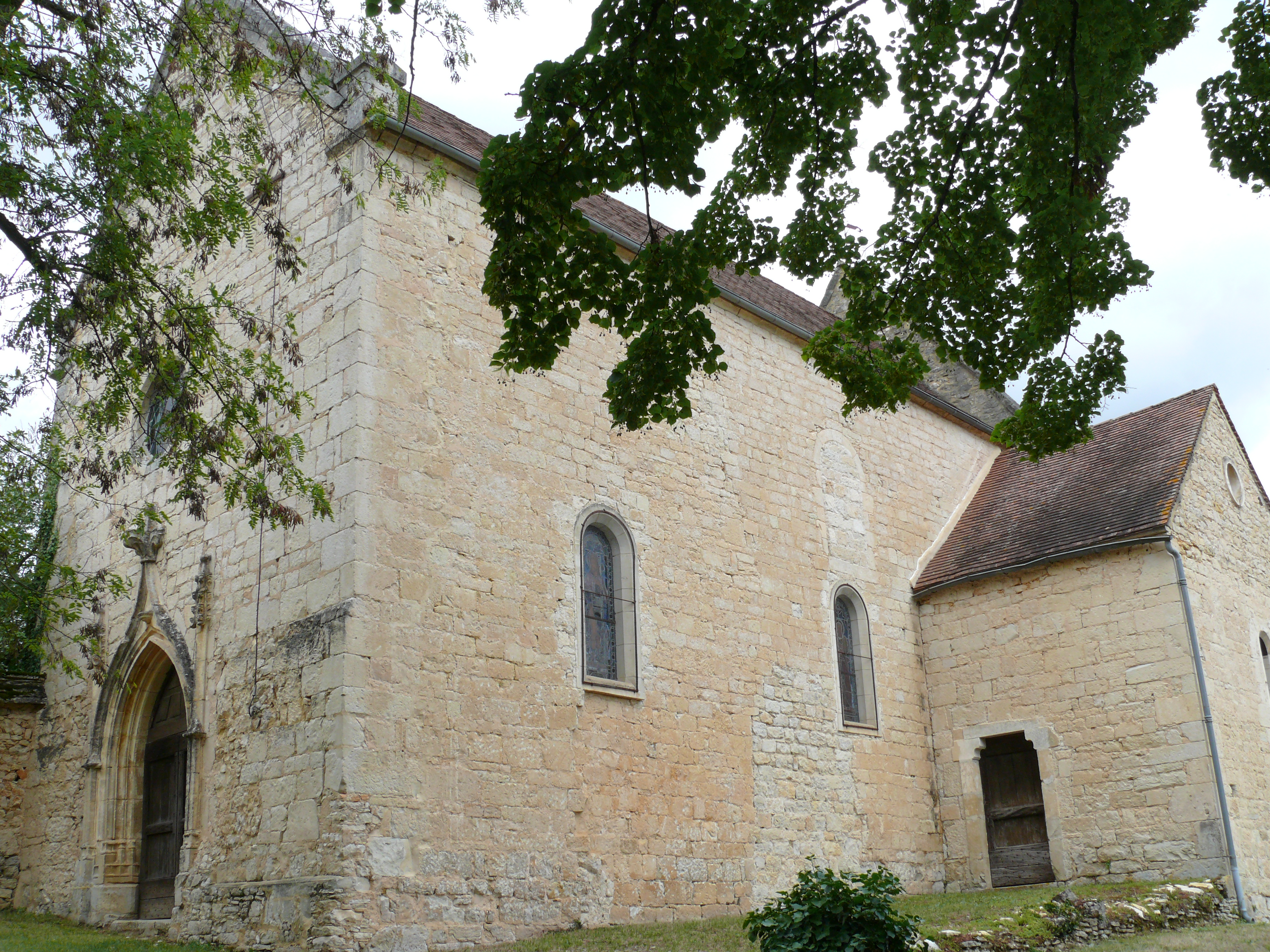 Bouzic - Eglise Saint-Barthélemy